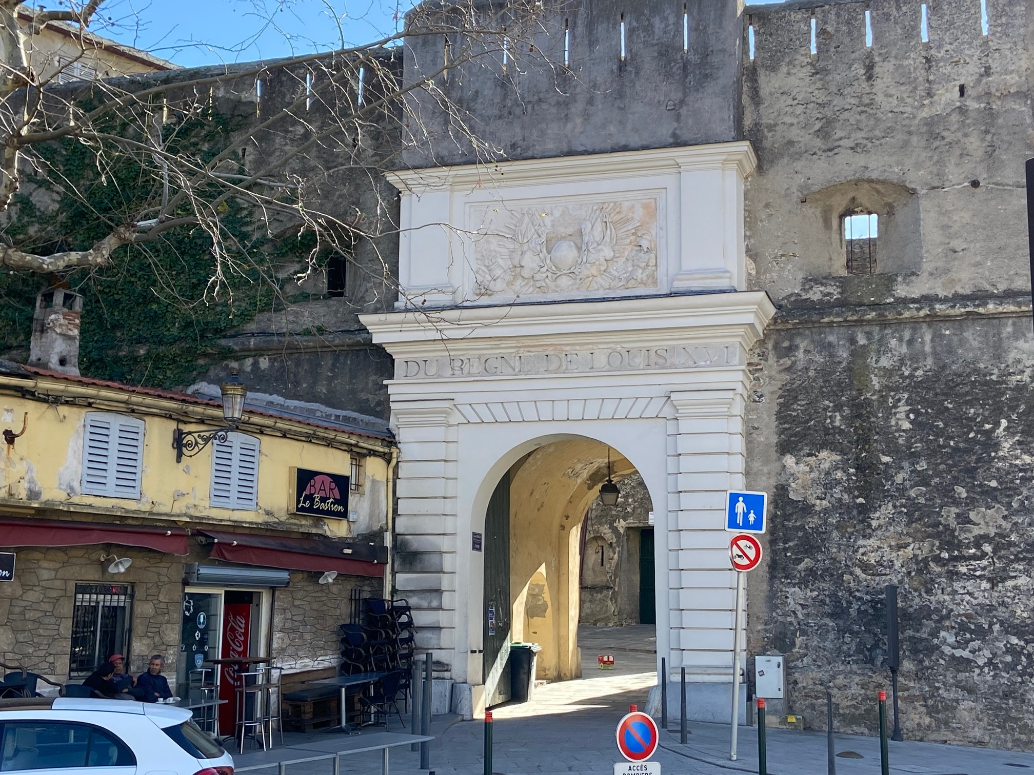 Corsu: Porta di a citatella di Bastia, corsu Favale. Chjamata dinù "Porte Louis XVI".